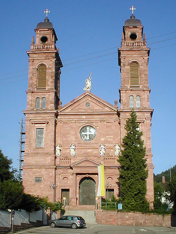 Church St. Johannes Nepomuk in Eberbach (Baden)